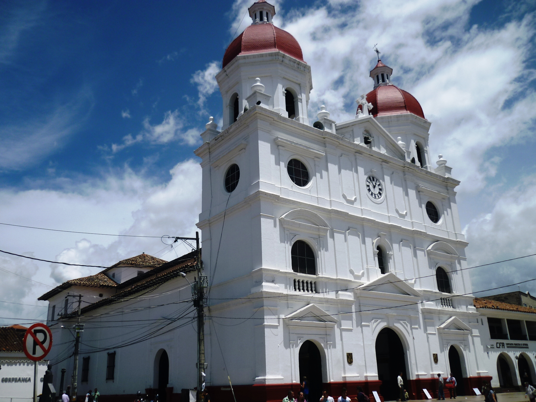 Catedral de San Nicolas El Magno y Santuario Mariano de Nuestra Señora de la Purisima Concepción del Santisimo Rosario de Arma de Rionegro